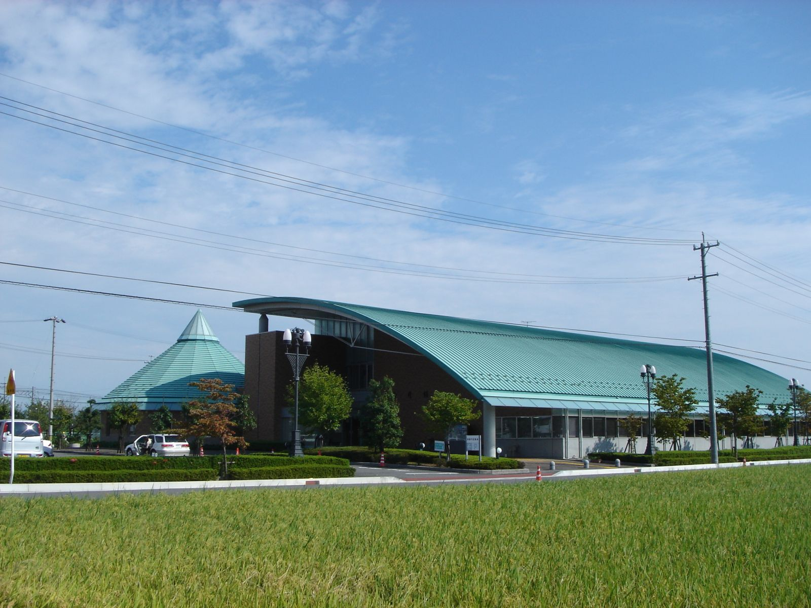 Mizuho Municipal Library（瑞穂市立図書館・楽修館）,Mizuho,Gifu,Japan(岐阜県瑞穂市)で撮影。